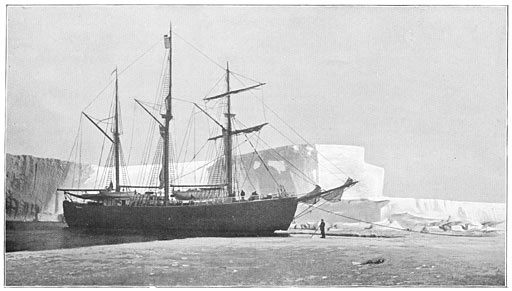 Aan de Zuidpool